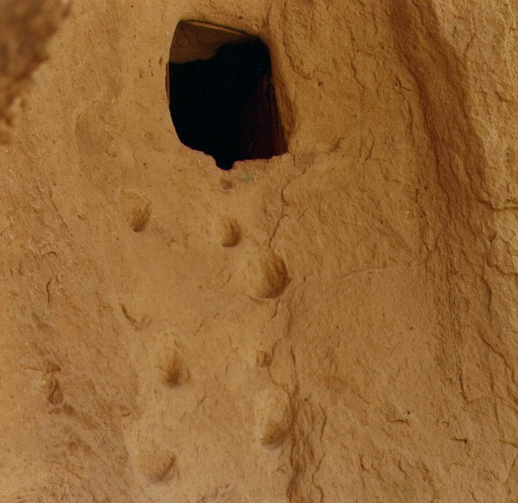 Senkrechte "Treppe" in Zelve, Kappadokien, Zentraltürkei